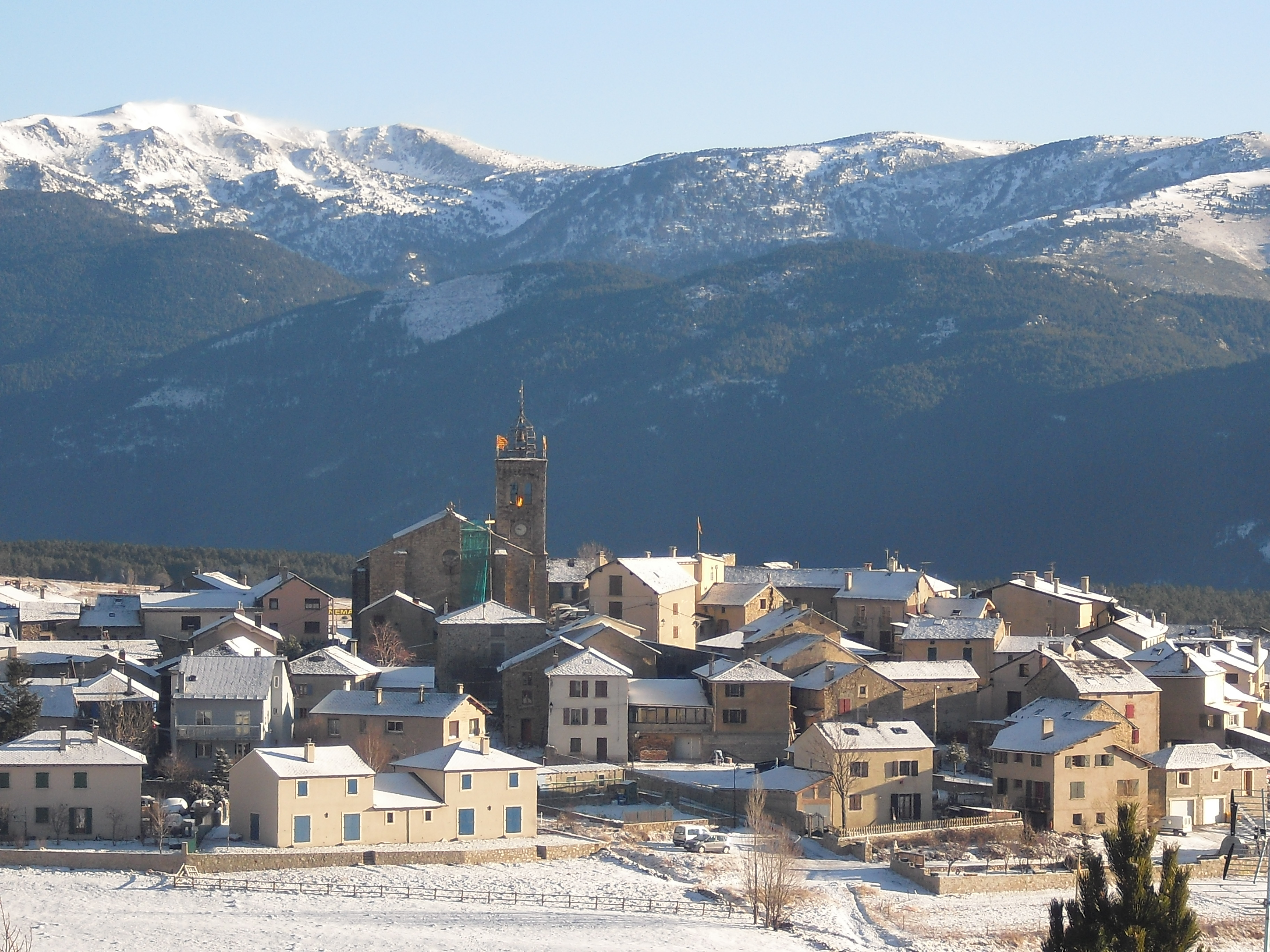 Les Angles en hiver (2009).